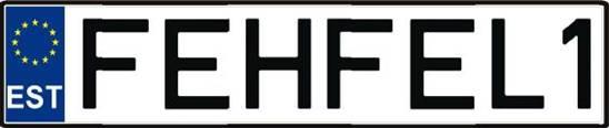 Индивидуальный эстонский автомобильный номер